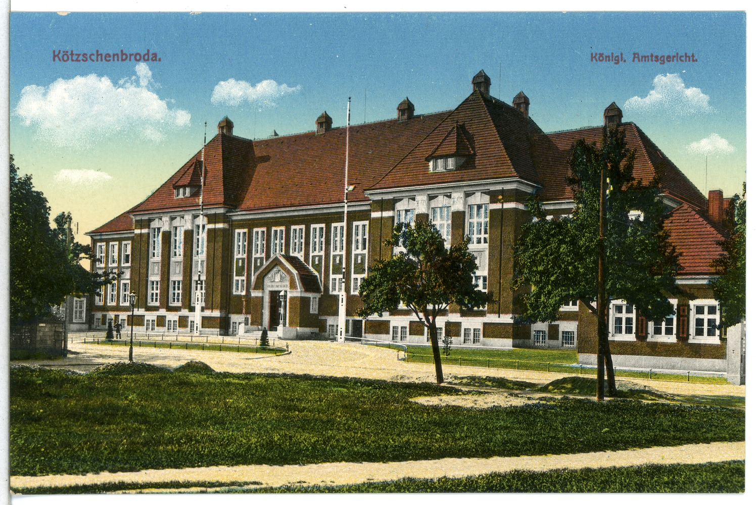 Kötzschenbroda; Amtsgericht This postcard is from publisher Brück & Sohn in Meißen ( postcard has a unique number 15253 and is available in a higher resolution at the publisher. This images was uploaded in a cooperation project between Wikipedians and the publisher.